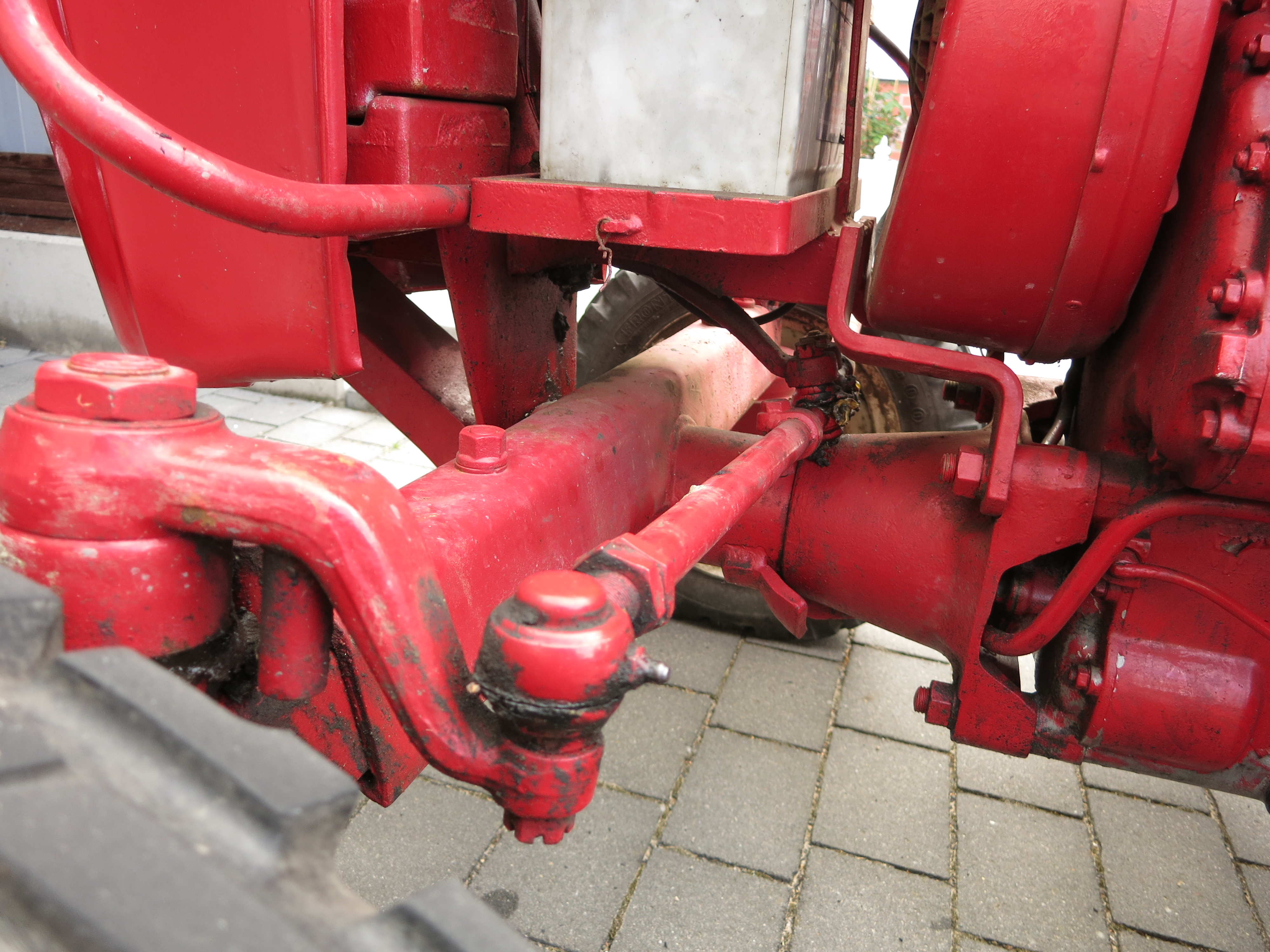 Pendelvorderachse eines Porsche 218